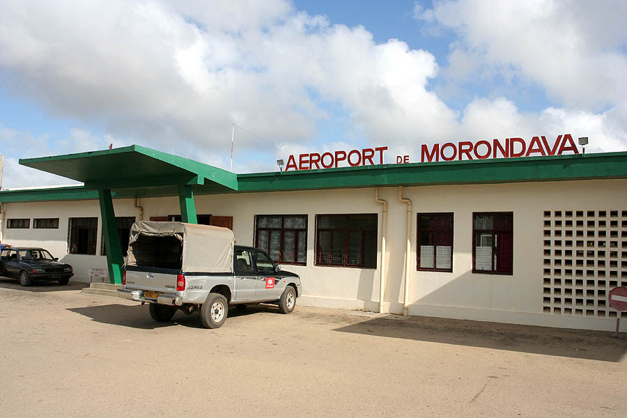 Morondava Airport (MOQ), Madagascar